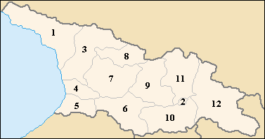 Любомир Таушанов, 2005 г.